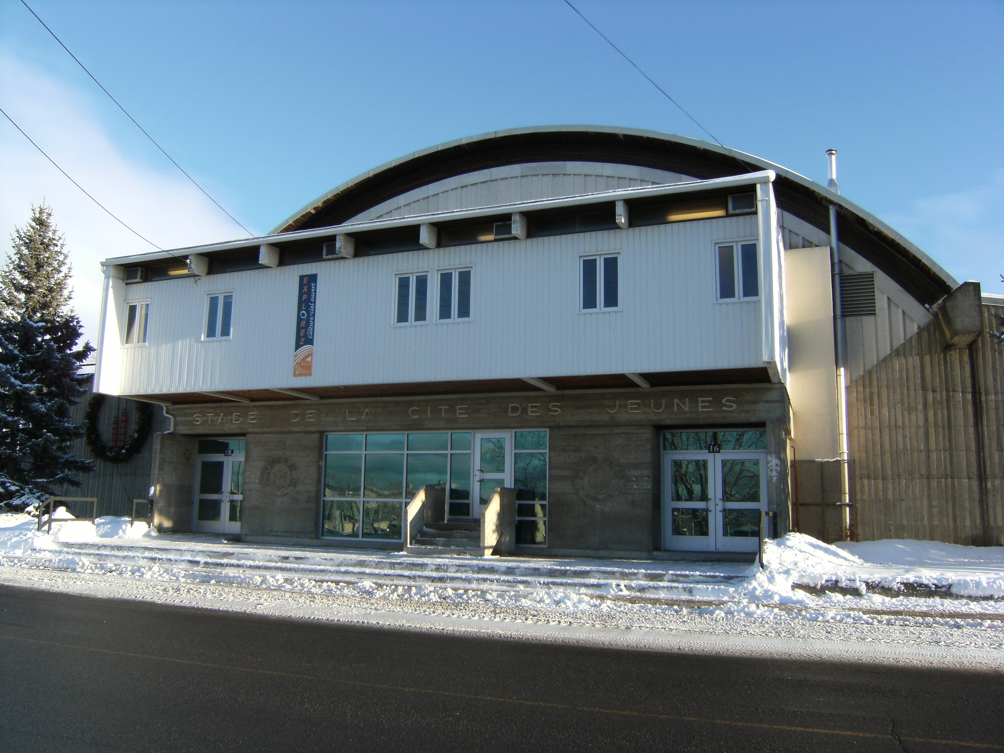 Stade de la cité des jeunes, Rivière-du-Loup, Québec